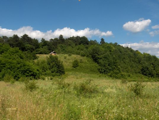 Pogled na gradinu Klinac grad na Klimna gori kod Petrinje